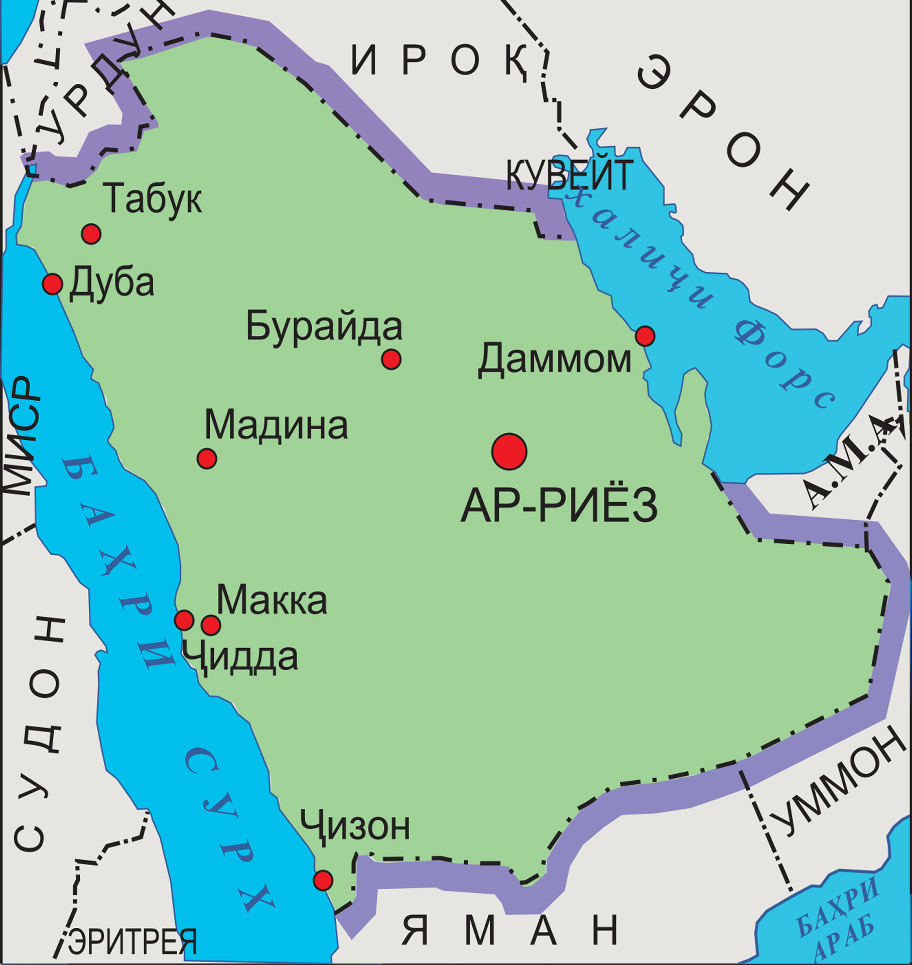 Тоҷикӣ: Харитаи маъмурии Арабистони Саудӣ